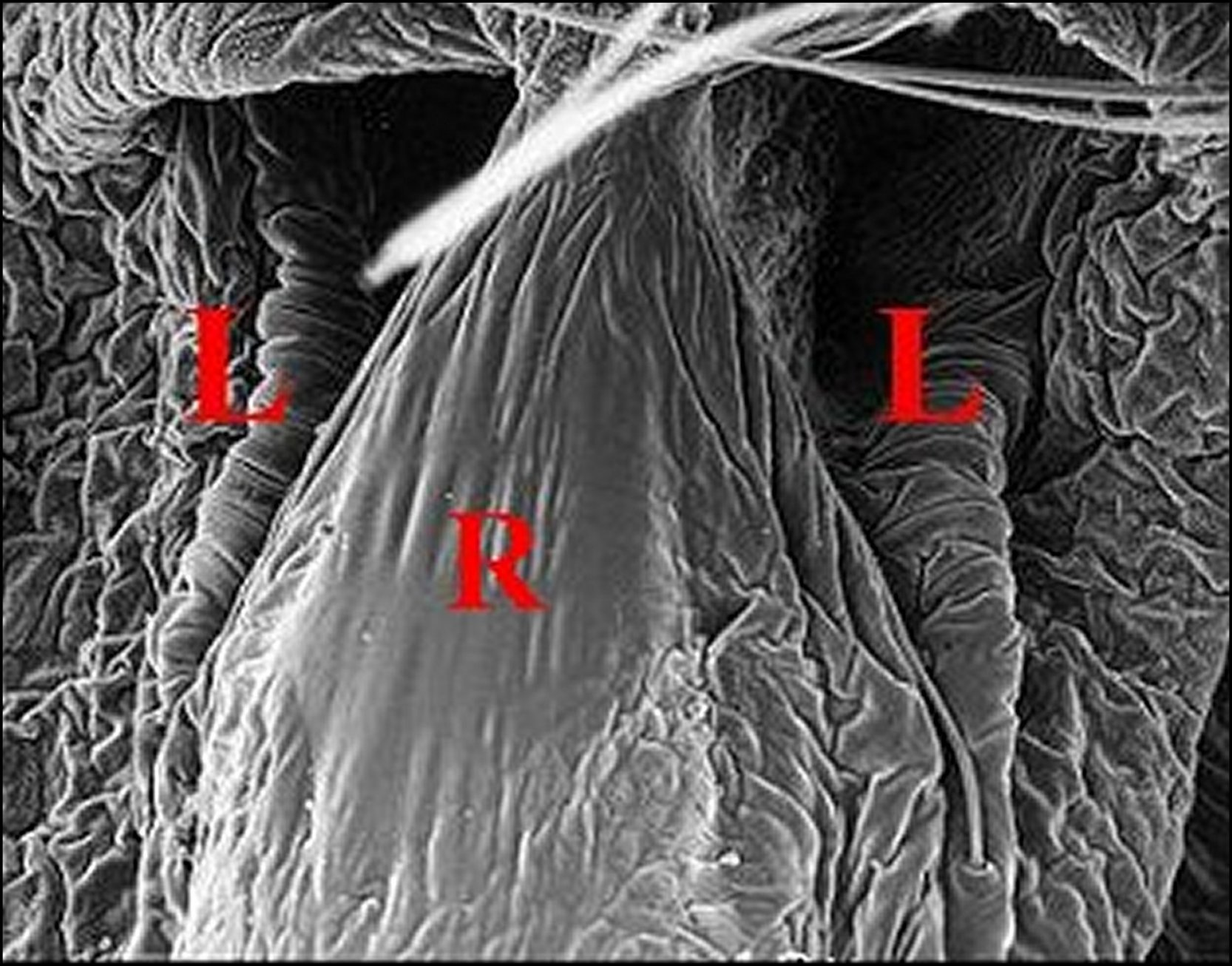 Pédicule d' Argyroneta aquatica en vue ventrale au microscope électronique à balayage.